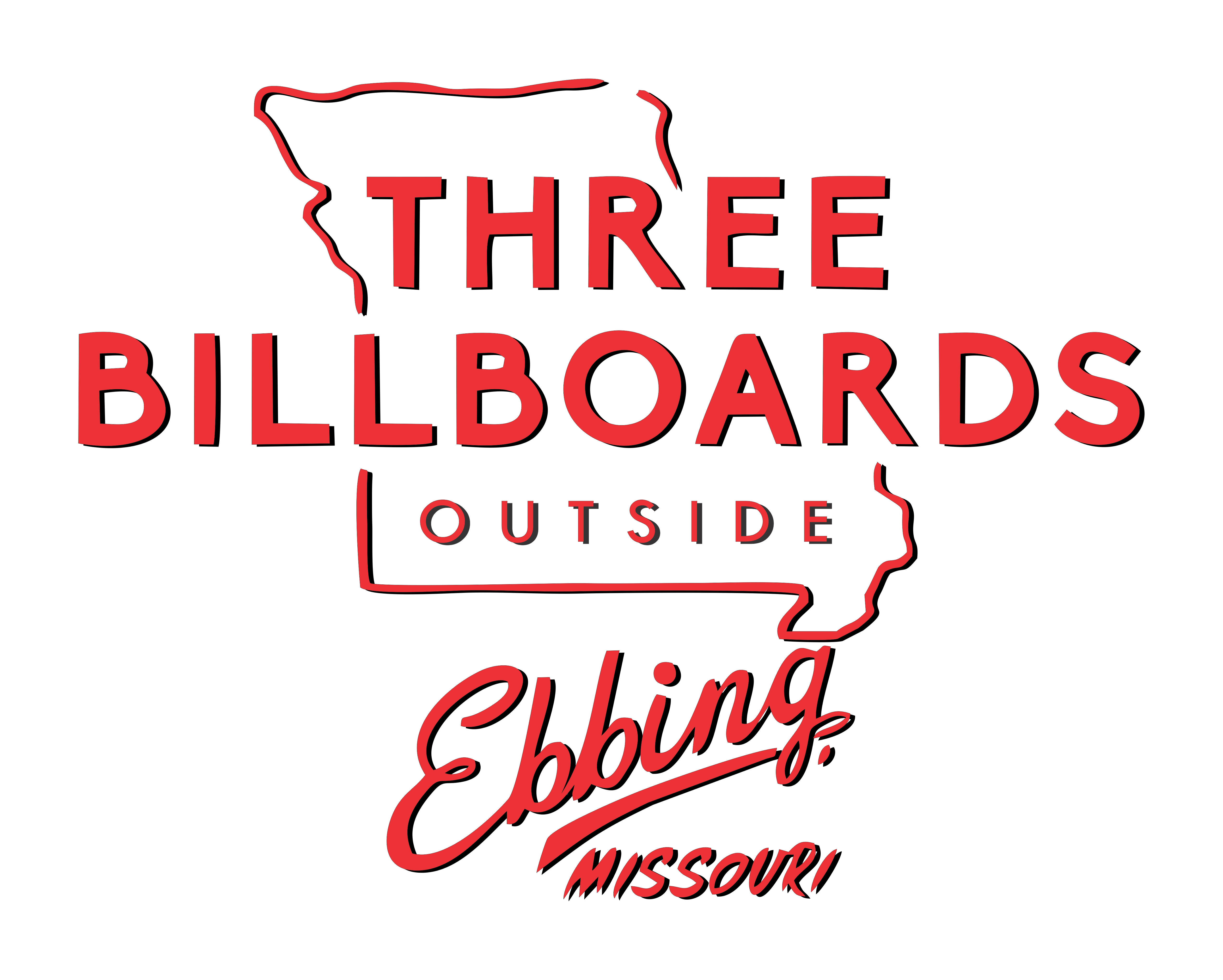 Logotipo de la cinta "Three Billboards Outside Ebbing, Missouri" de 2017.